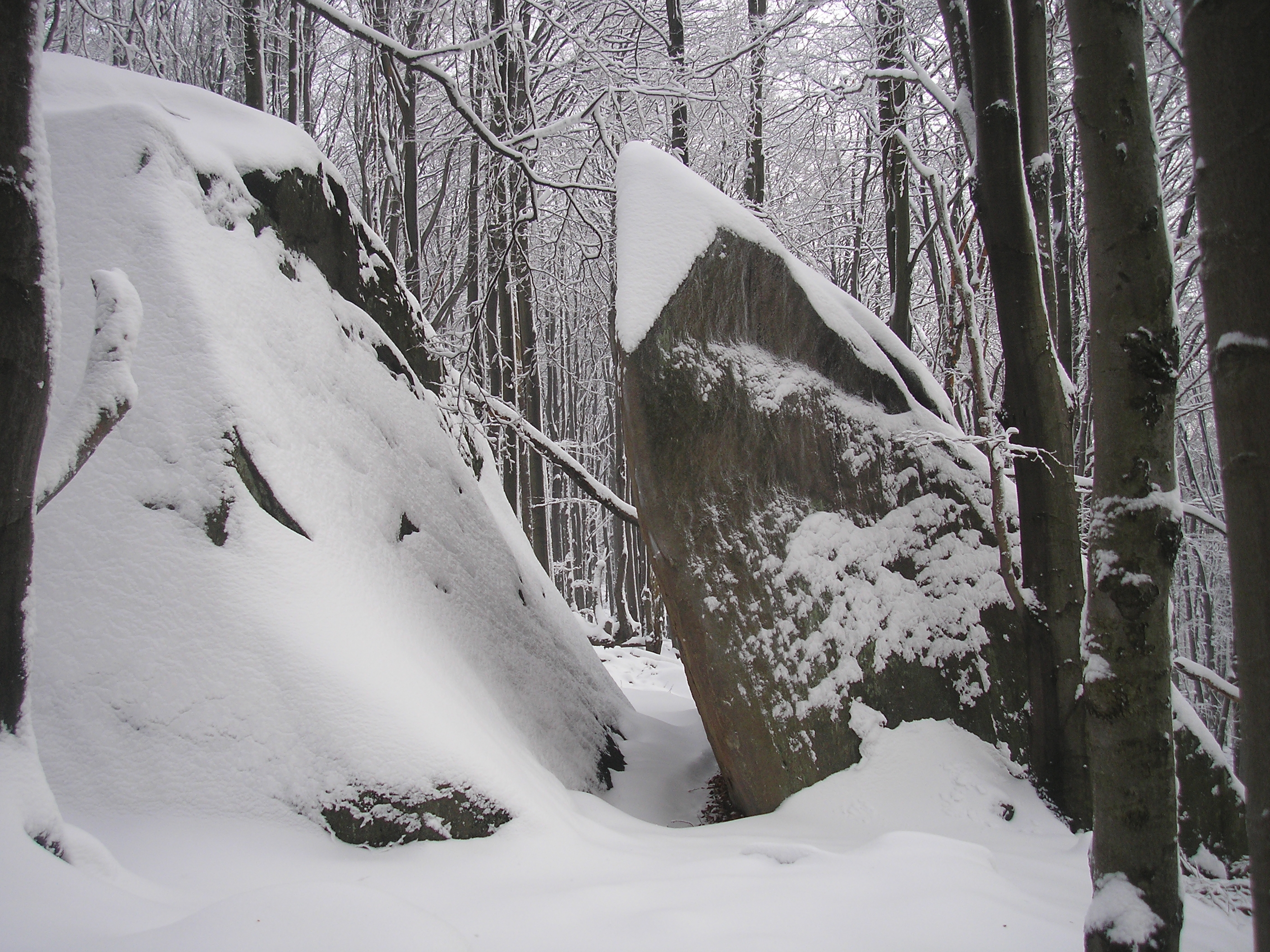 Specjalny obszar ochrony siedlisk Ostoja Magurska. This is a photography of Natura 2000 protected area with ID PLH180001